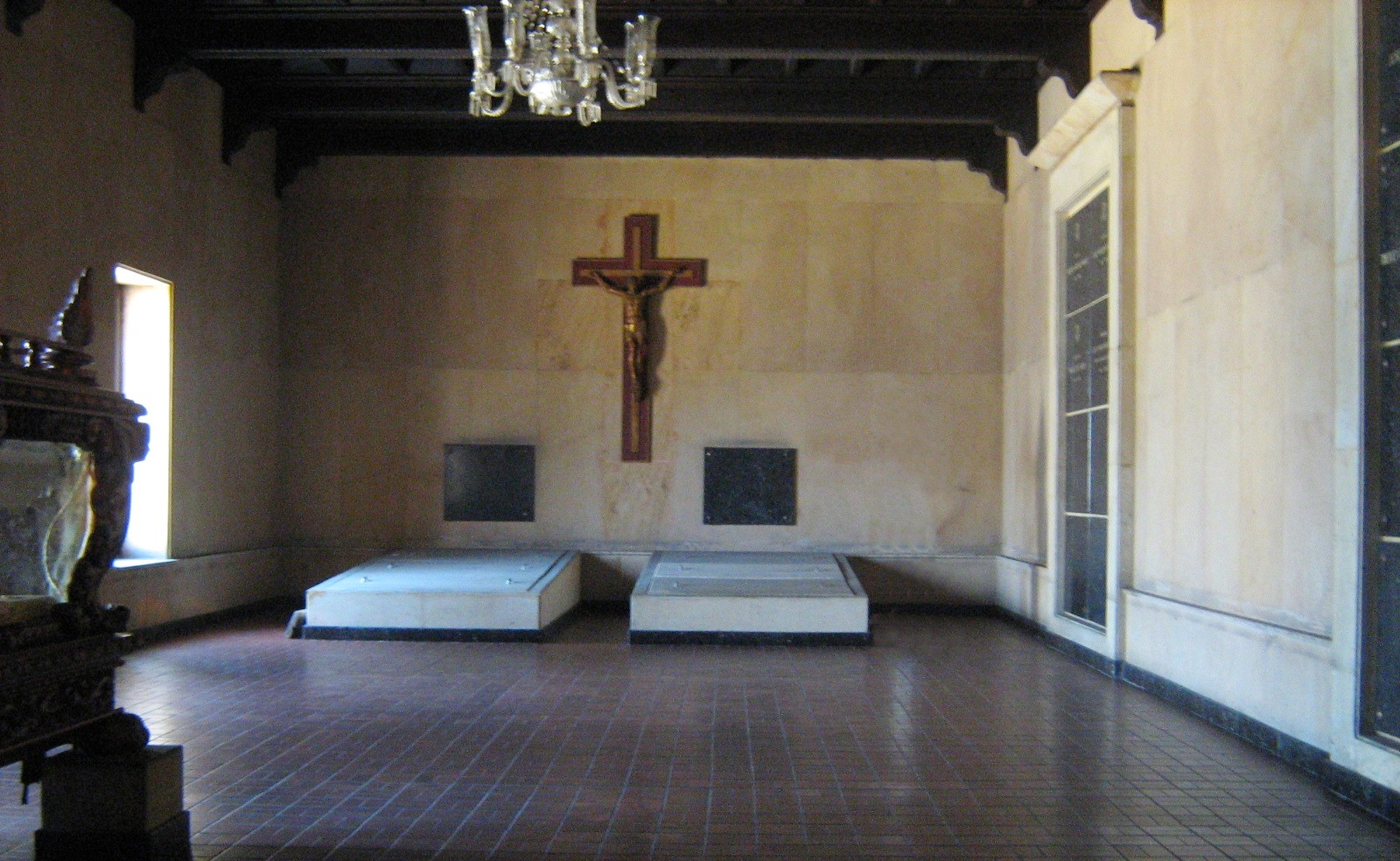 Mausoleo de Obispos de la Catedral Metropolitana de Medellín, ubicado en una sala contigua que da justo con el ala accidental del transepto, allí reposan los restos de los Obispos: Valerio Antonio Jiménez Hoyos, José Joaquín Isaza Ruíz y José Ignacio Montoya Peláez. Los Arzobispos: Joaquín Pardo Vergara, Manuel José Caycedo Martínez, Tiberio de Jesús Salazar y Herrera, y Mons. Jesús Maria Marulanda. Colombia